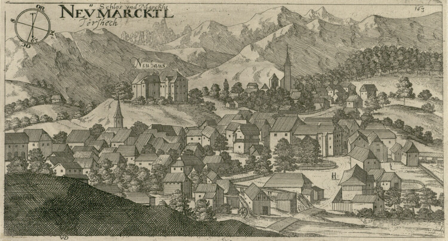 Tržič z gradom Neuhaus